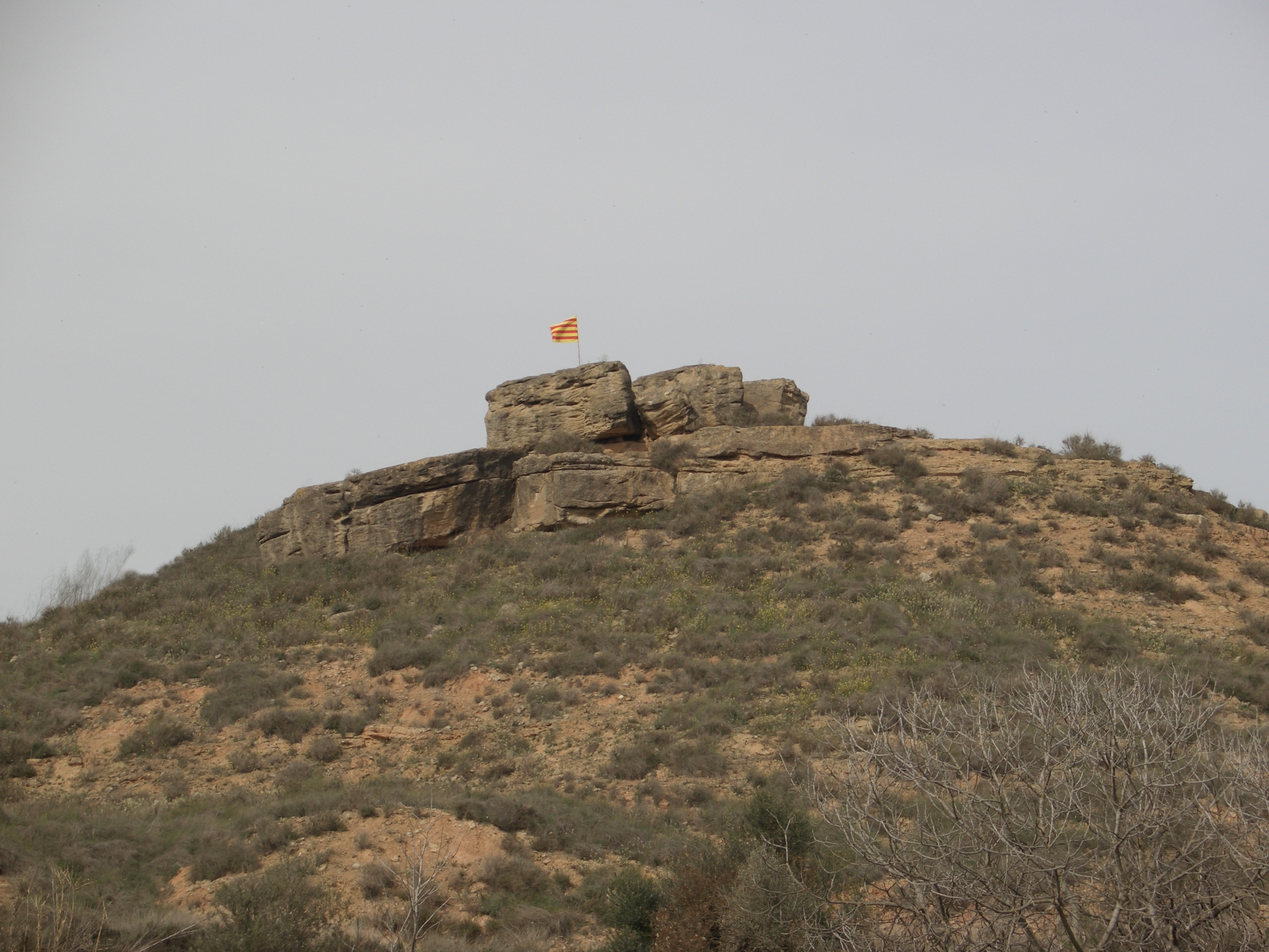 Imatge propera del Tossal de les Cases de Corbins.